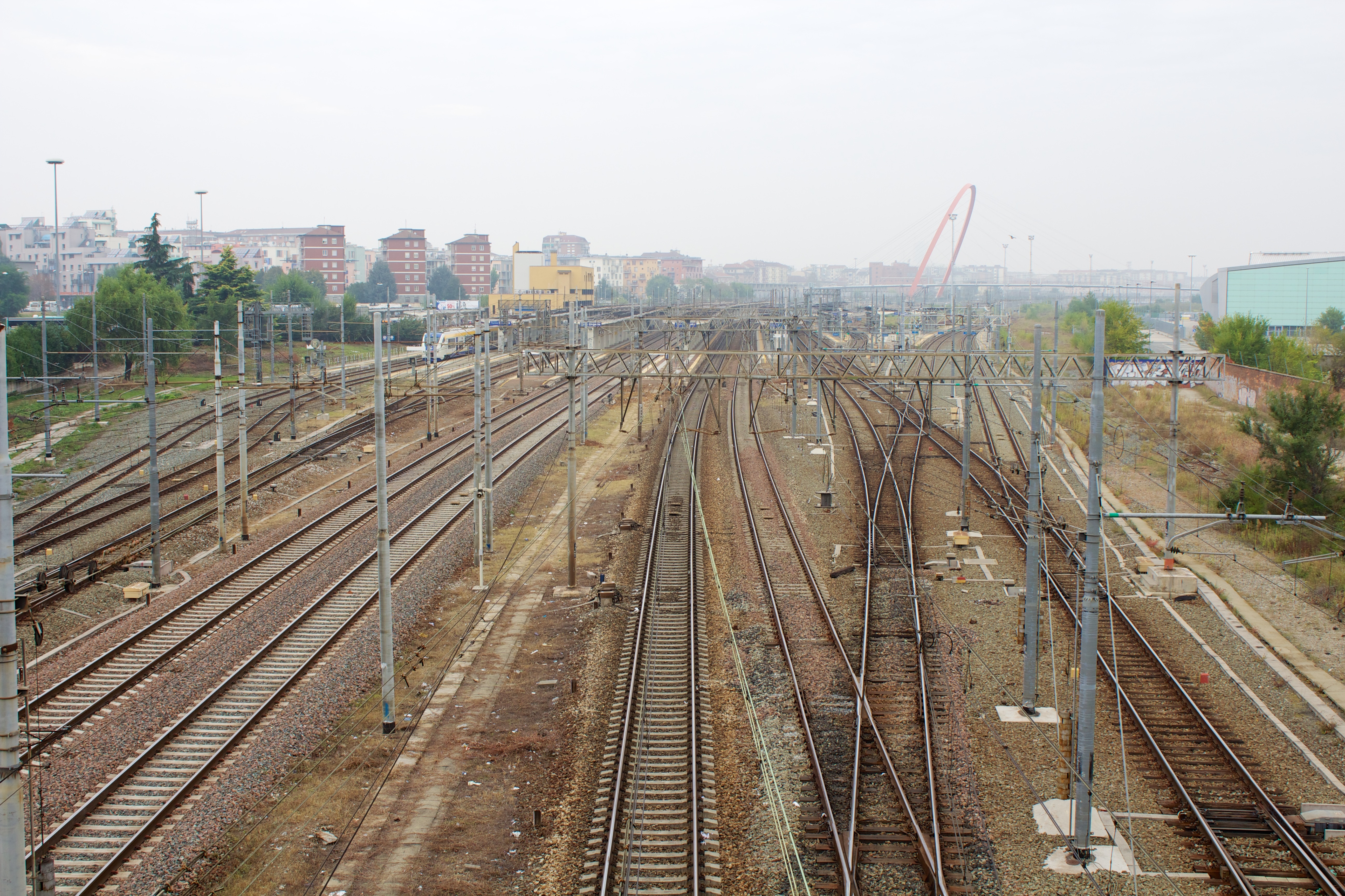 Piazzale binari della stazione di Torino Lingotto